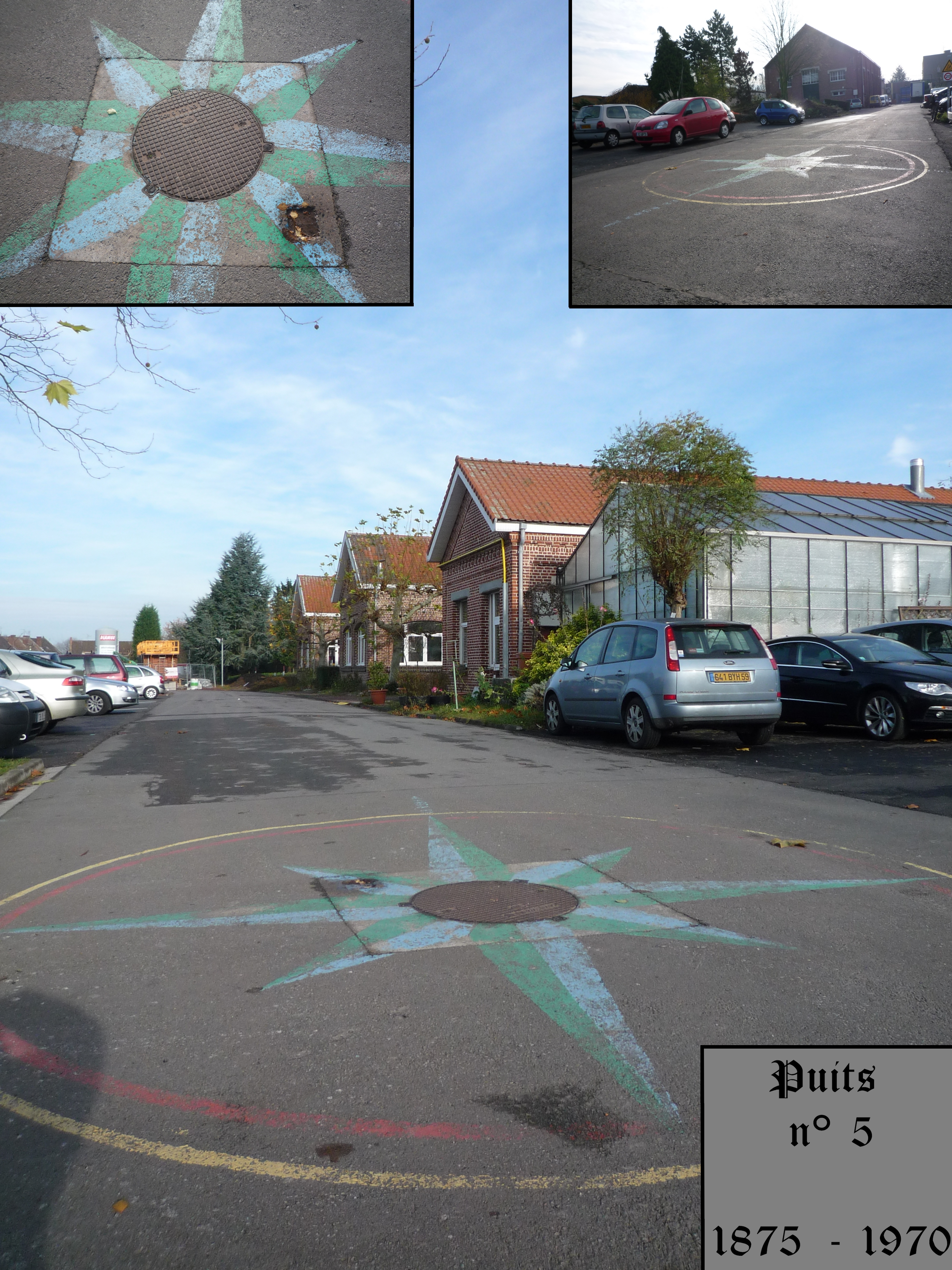 La Fosse n° 5 de la Compagnie des mines de l'Escarpelle était un charbonnage constitué d'un seul puits situé à Douai (Dorignies), Nord, Nord-Pas-de-Calais, France.